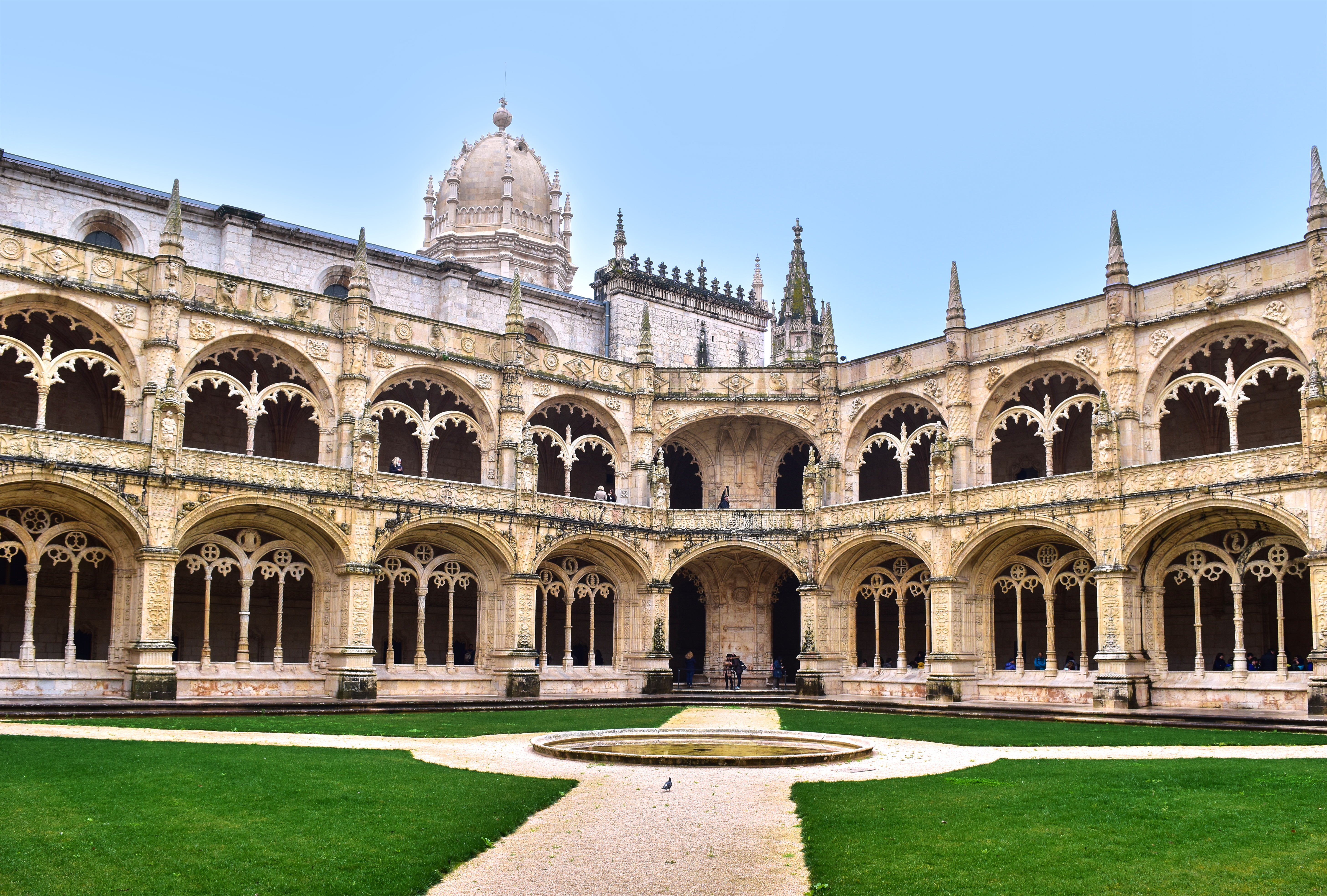 Jerónimos Monastery from inside